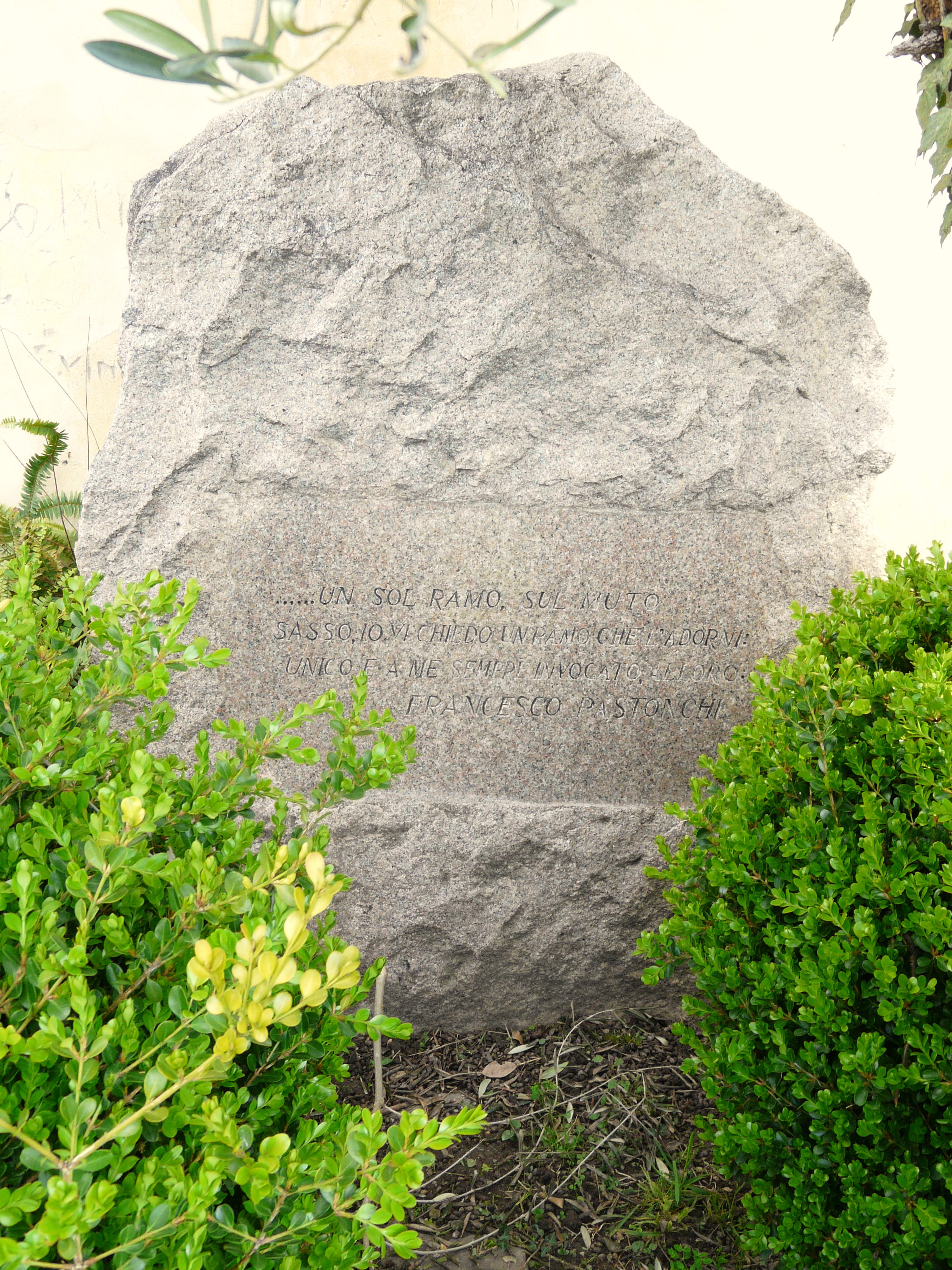 Tomba di Francesco Pastonchi di Riva Ligure, Liguria, Italia